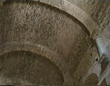 Rundtonne in der Klosterkirche Sant Pere de Rodez in Nordspanien Sonstiges: ...